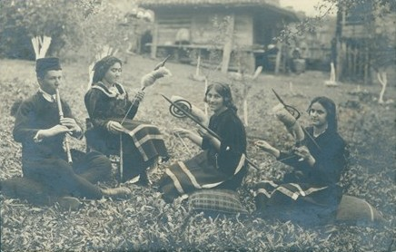 Седянка в с. Ново Паничарево, Бургаско, 11 май 1925 г.